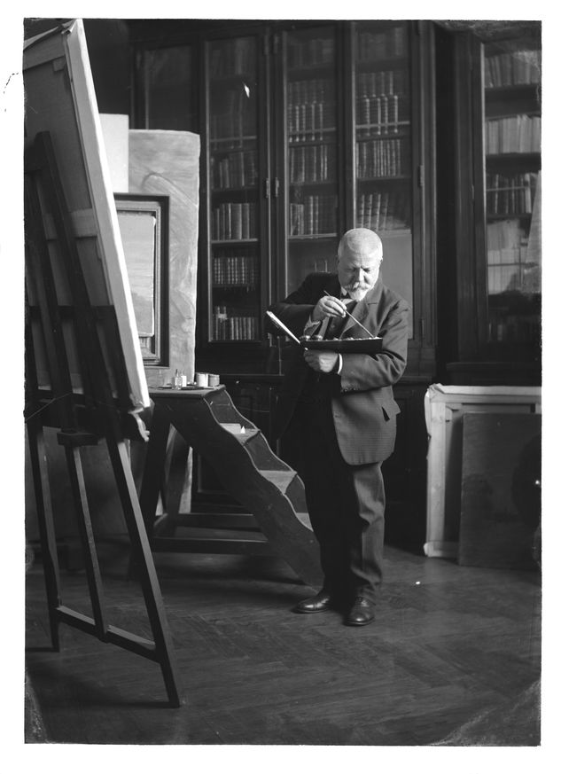 Emilio Sommariva (1883 - 1956) Gaetano Previati dipinge nel suo studio.jpg